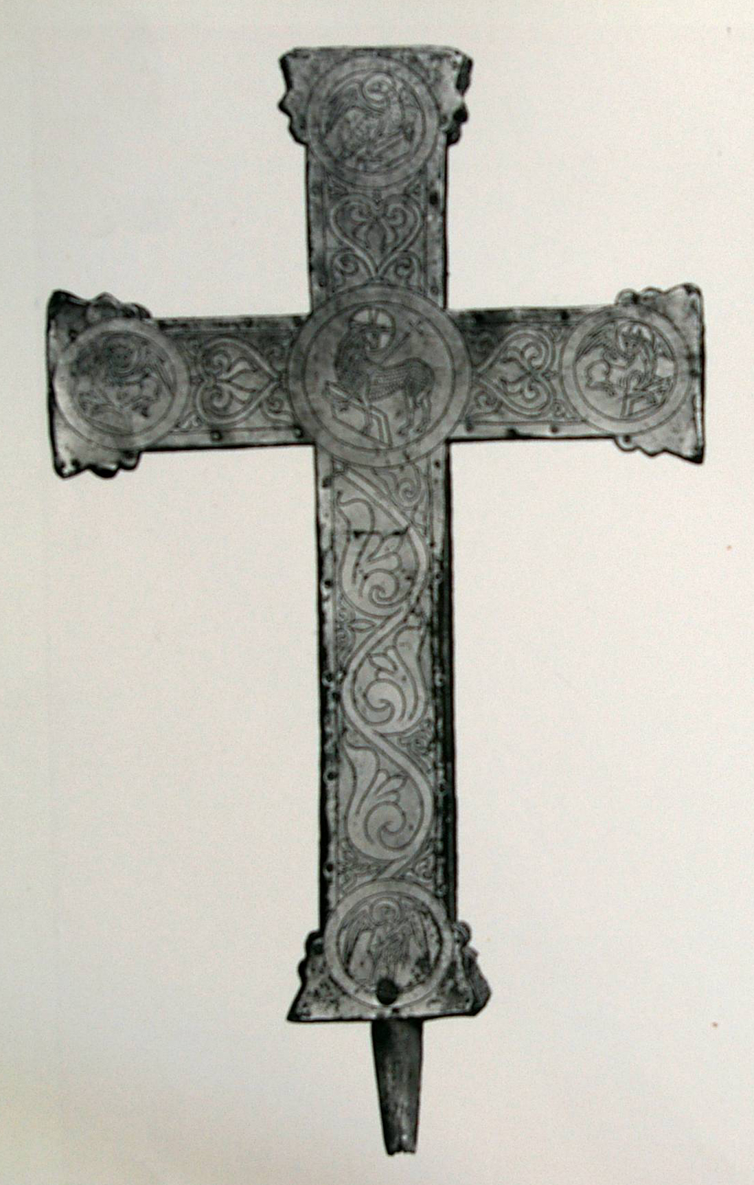 Tafel 16 links von Georg Humanns „Die Kunstwerke der Münsterkirche zu Essen“: Die Rückseite des des Otto-Mathilden-Kreuzes, Abbildung aus Georg Humanns Tafelwerk 1904